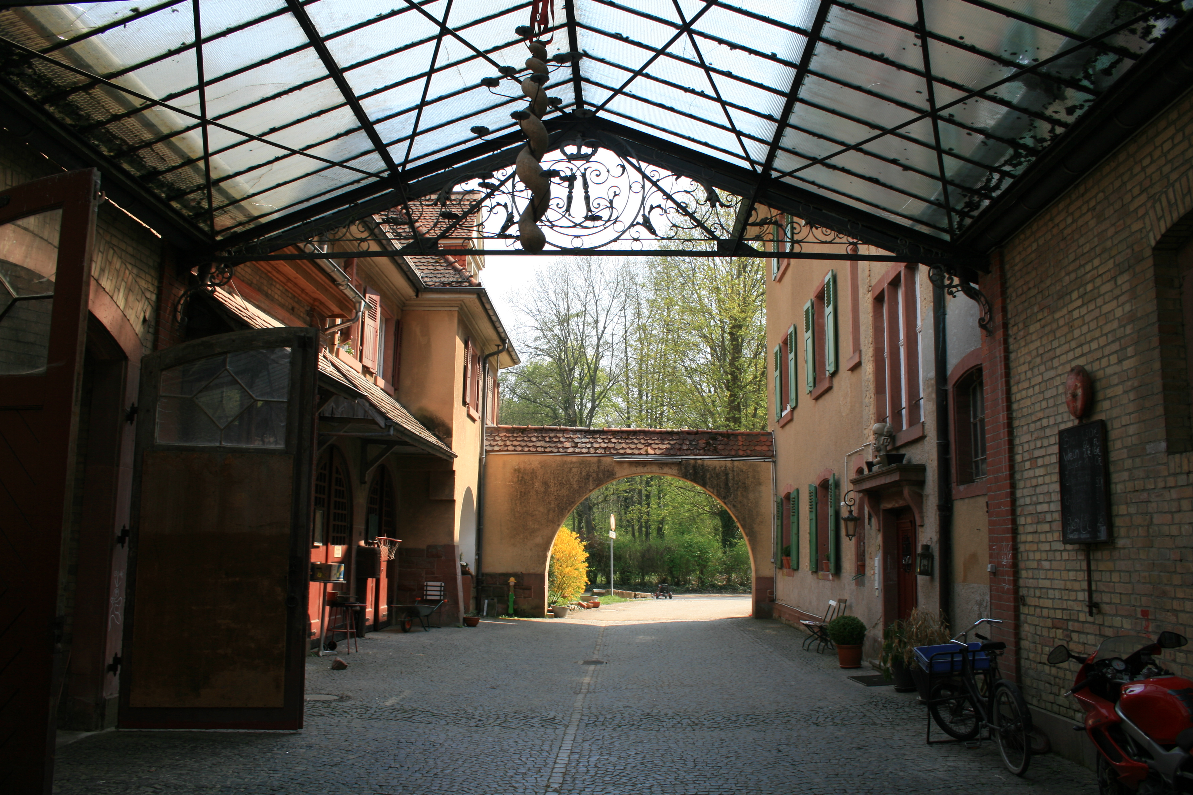 Langenzell, Gemeinde Wiesenbach (Baden)